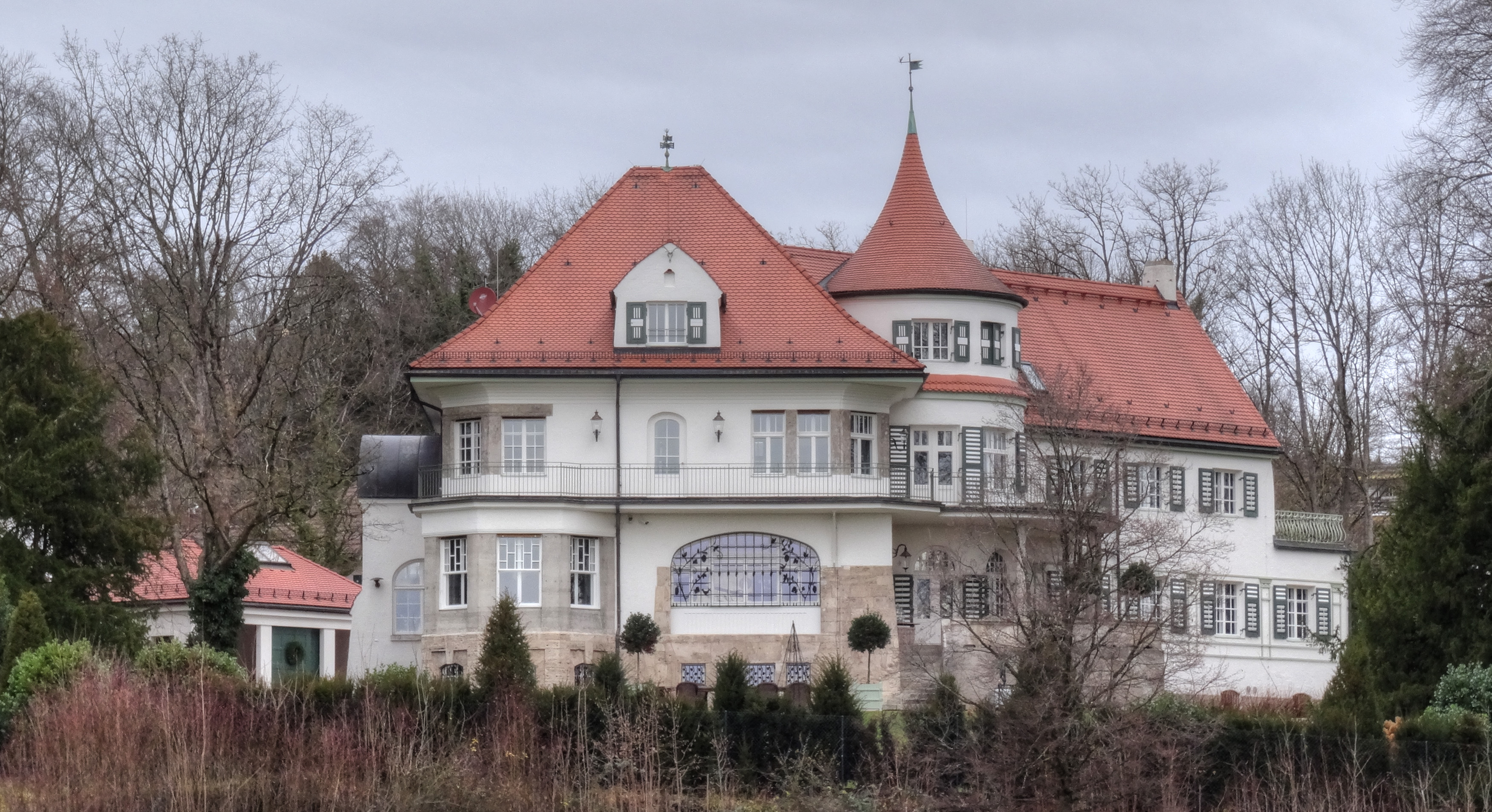 Villa Maffei,Feldafing 2019. Süd-Ostsseite (Blick vom Stadion) This is a photograph of an architectural monument.